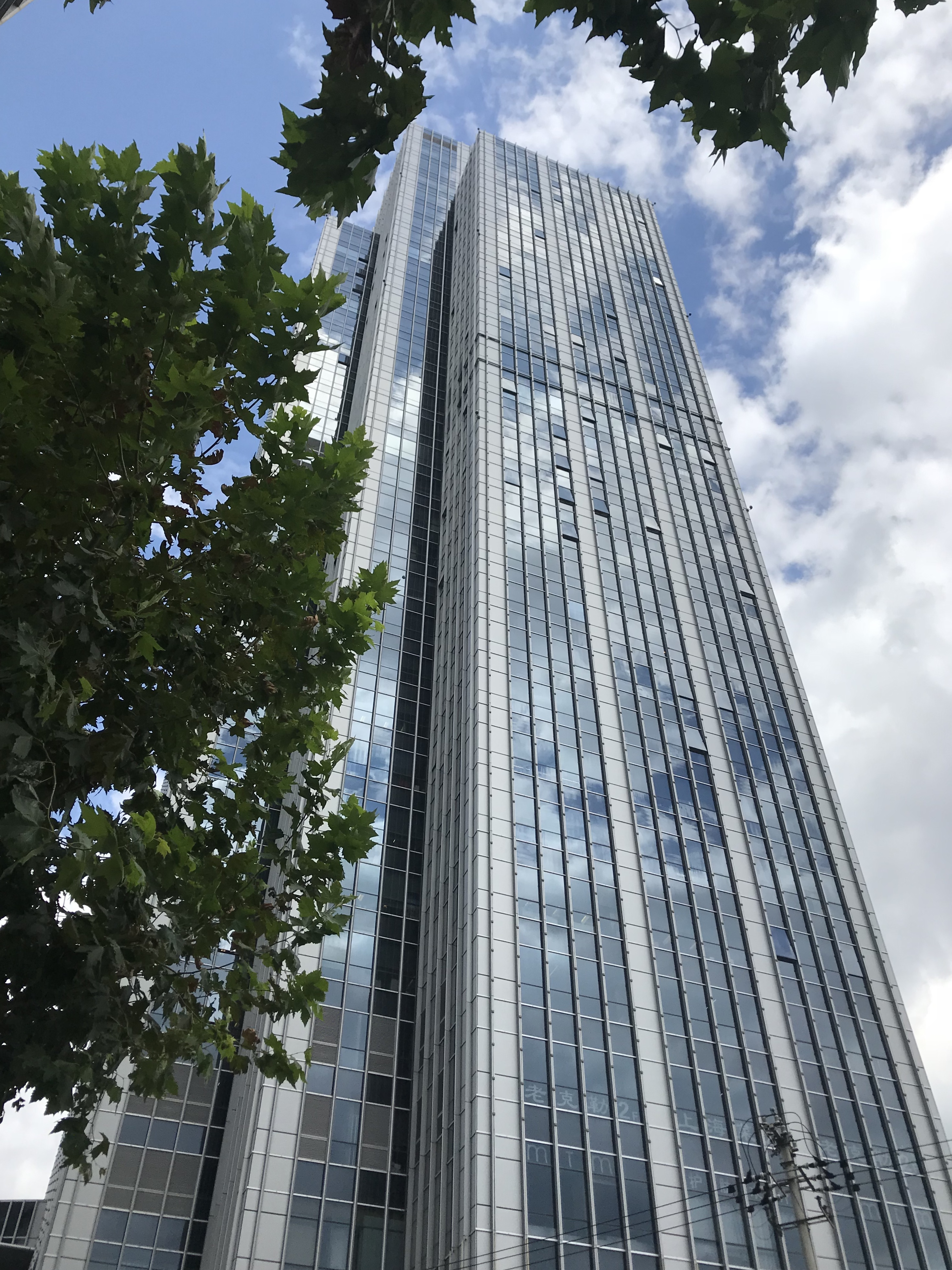 創興金融センター